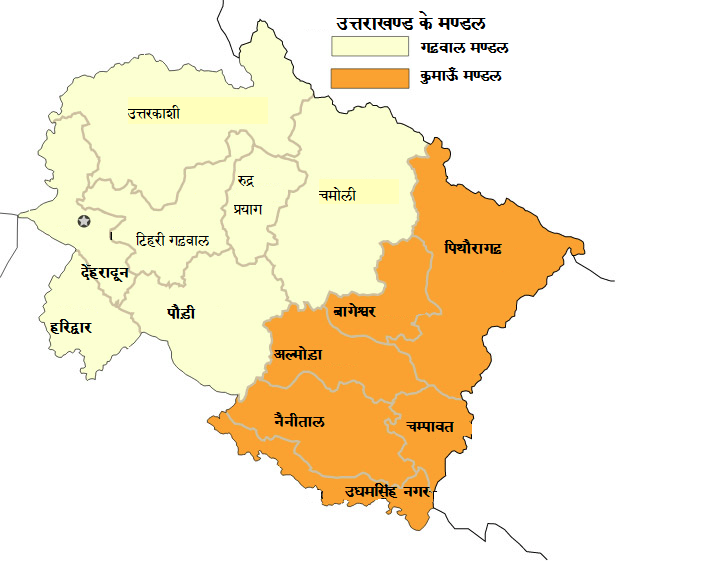 विकिपीडिया से लेकर पुनरारेखित किया, जिलों के नामों का हिन्दी लिप्यांतरण किया गया।.